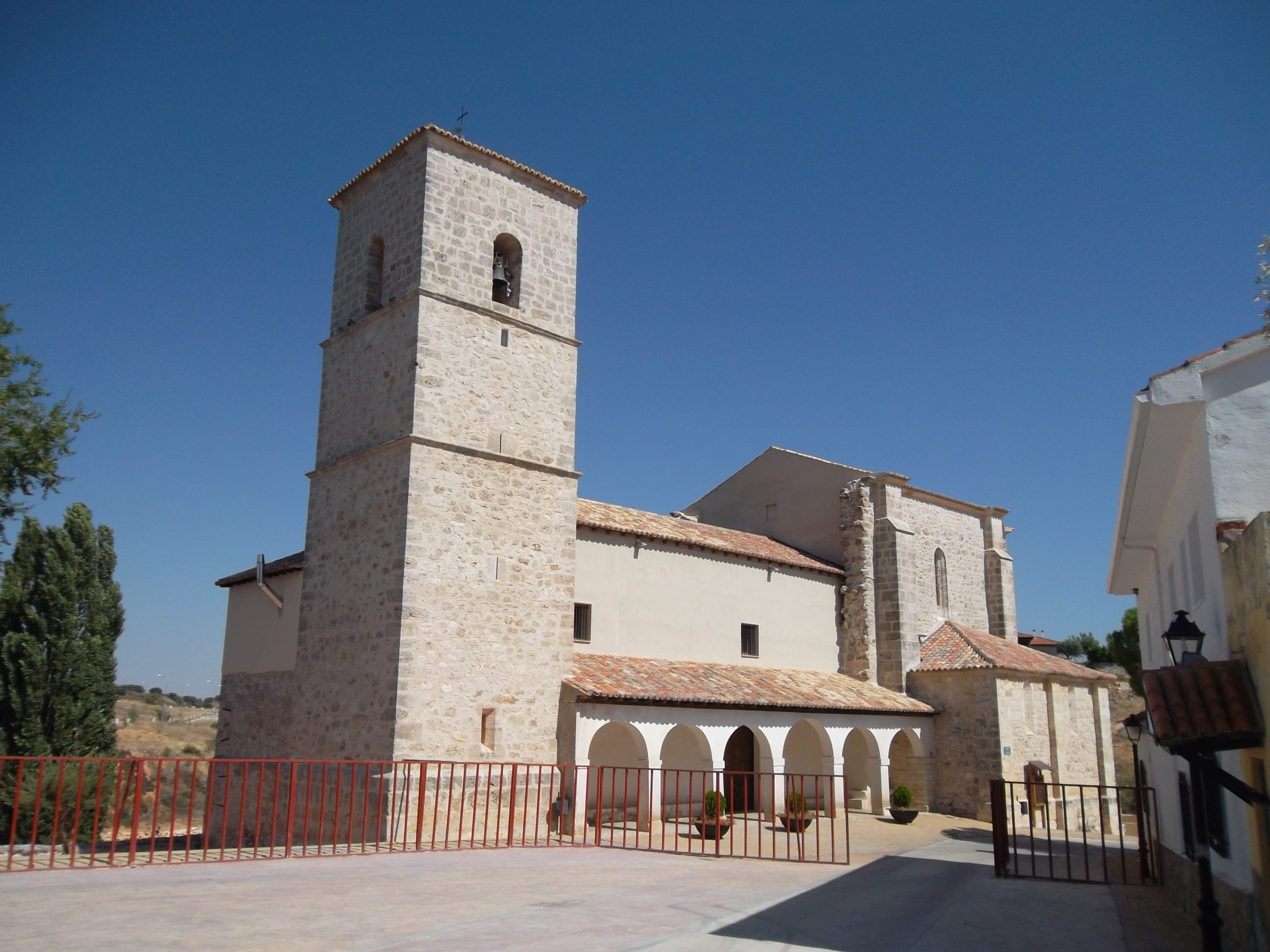 Yebes - La iglesia parroquial, dedicada a San Bartolomé, es obra monumental del siglo XVI.